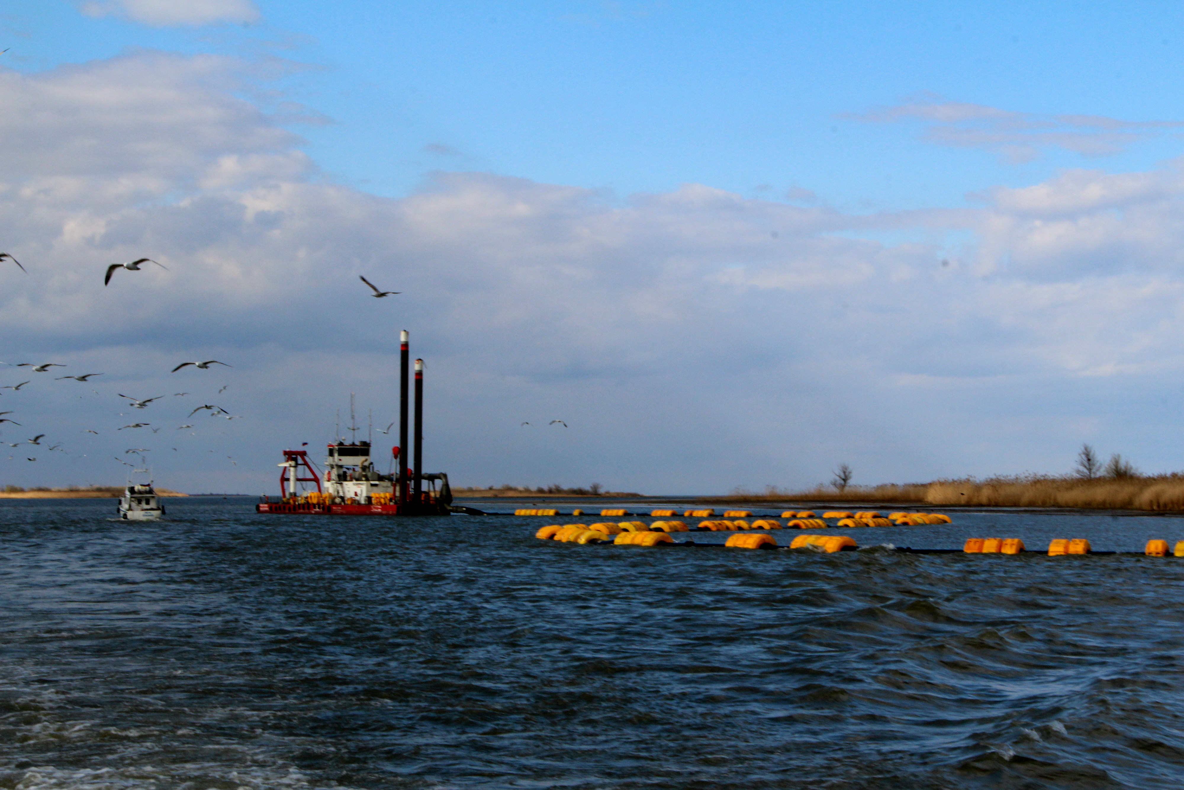 Volqa-Xəzər Gəmiçilik kanalında dib dərinləşdirmə işləri